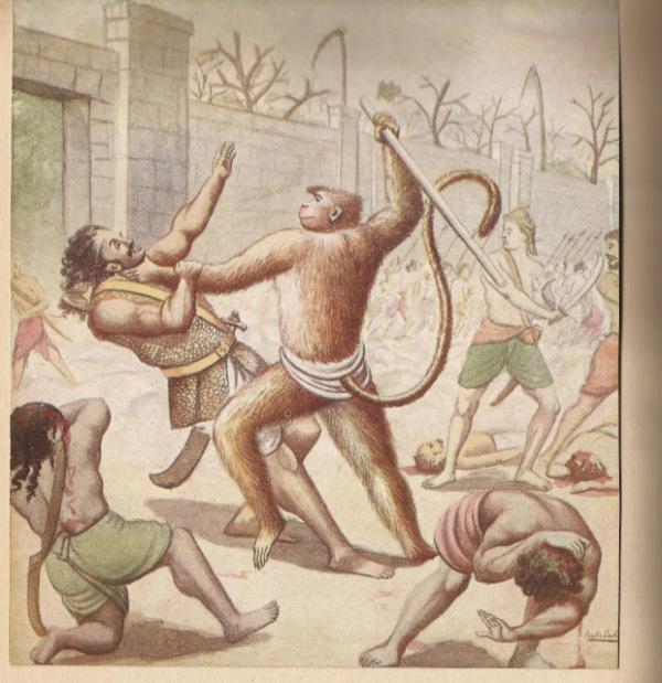 Chitra Ramayana (Illustrated Ramayana) is a simplified story of the great Indian epic in Kannada. The type is bold and beautiful. The thick pages have become brittle and need careful handling. Printed by B. Miller, Superintendent, British India, Press, Mazgaon, Bombay. It was published by, Shrimat Balasaheb Pandit Pant Pratinidhi, chief of Aundh, at Aundh, Satara district. The Kannada version is by Ramachandra Madhwa Mahishi The date shown is 1916. It is all the more important because the book contains illustrations painted by the publisher also called Bhavan Rao Shrinivas Rao, the ruler of the state of Aundh himself.